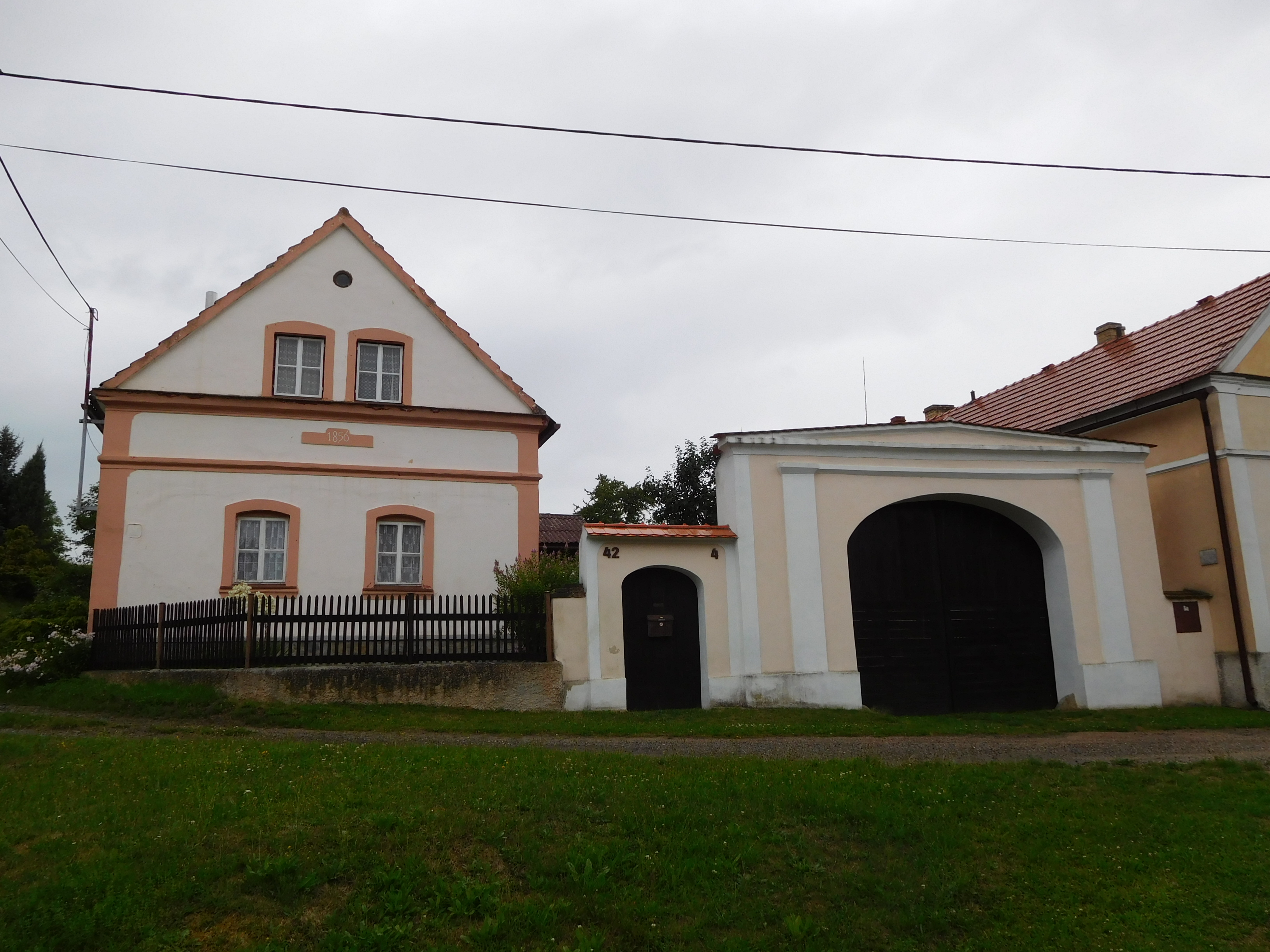 Lipno - usedlost č.p. 42